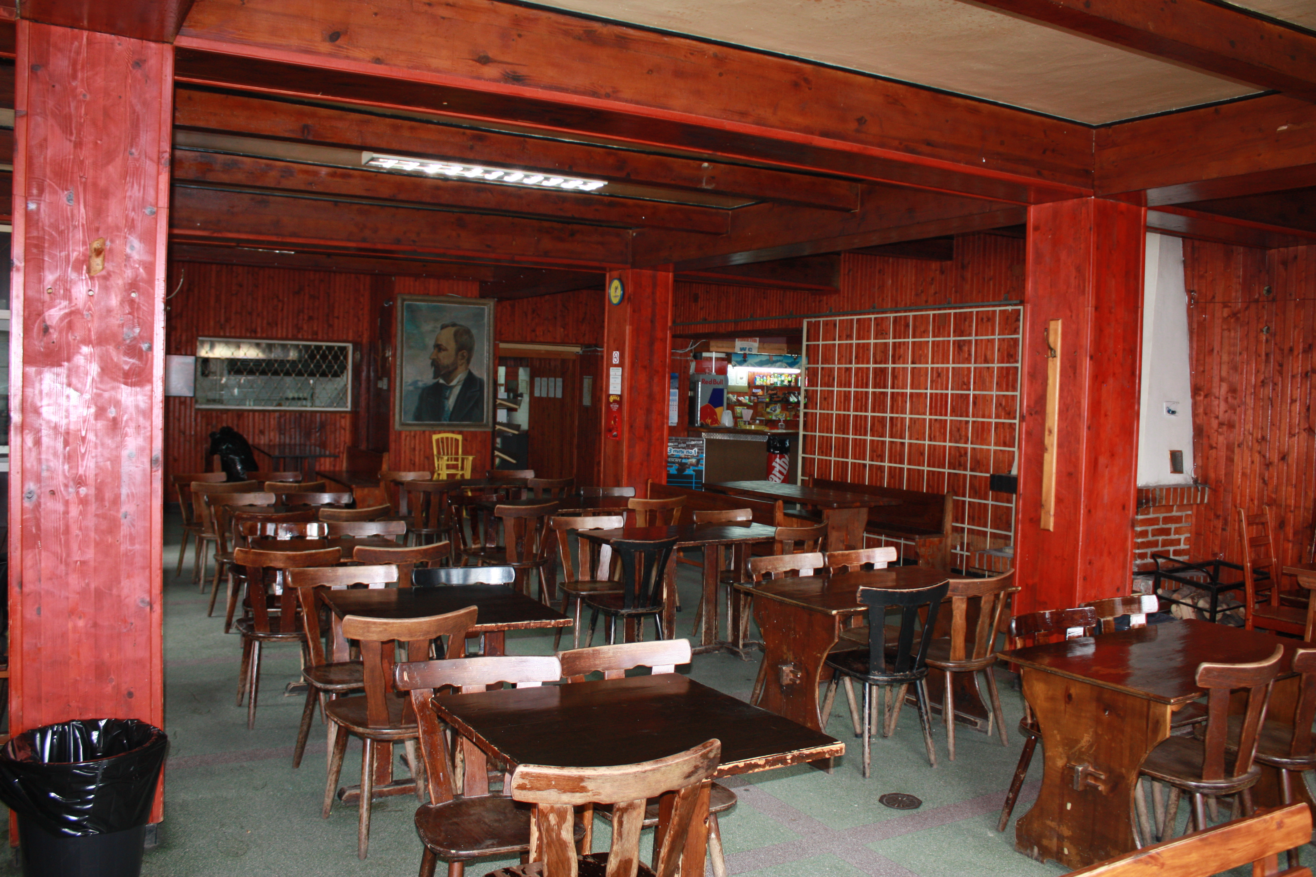 Vitosha mountain Aleko, Sofia, Bulgaria, Witoschagebirge, Витоша